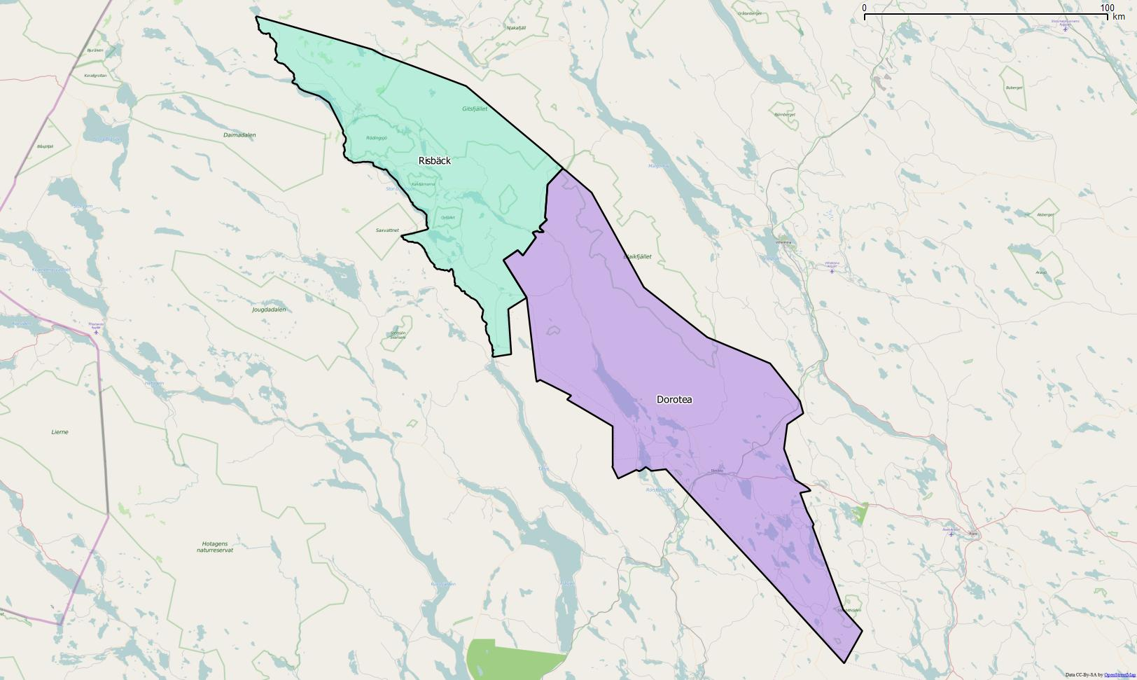 Distriktsindelningen i Dorotea kommun